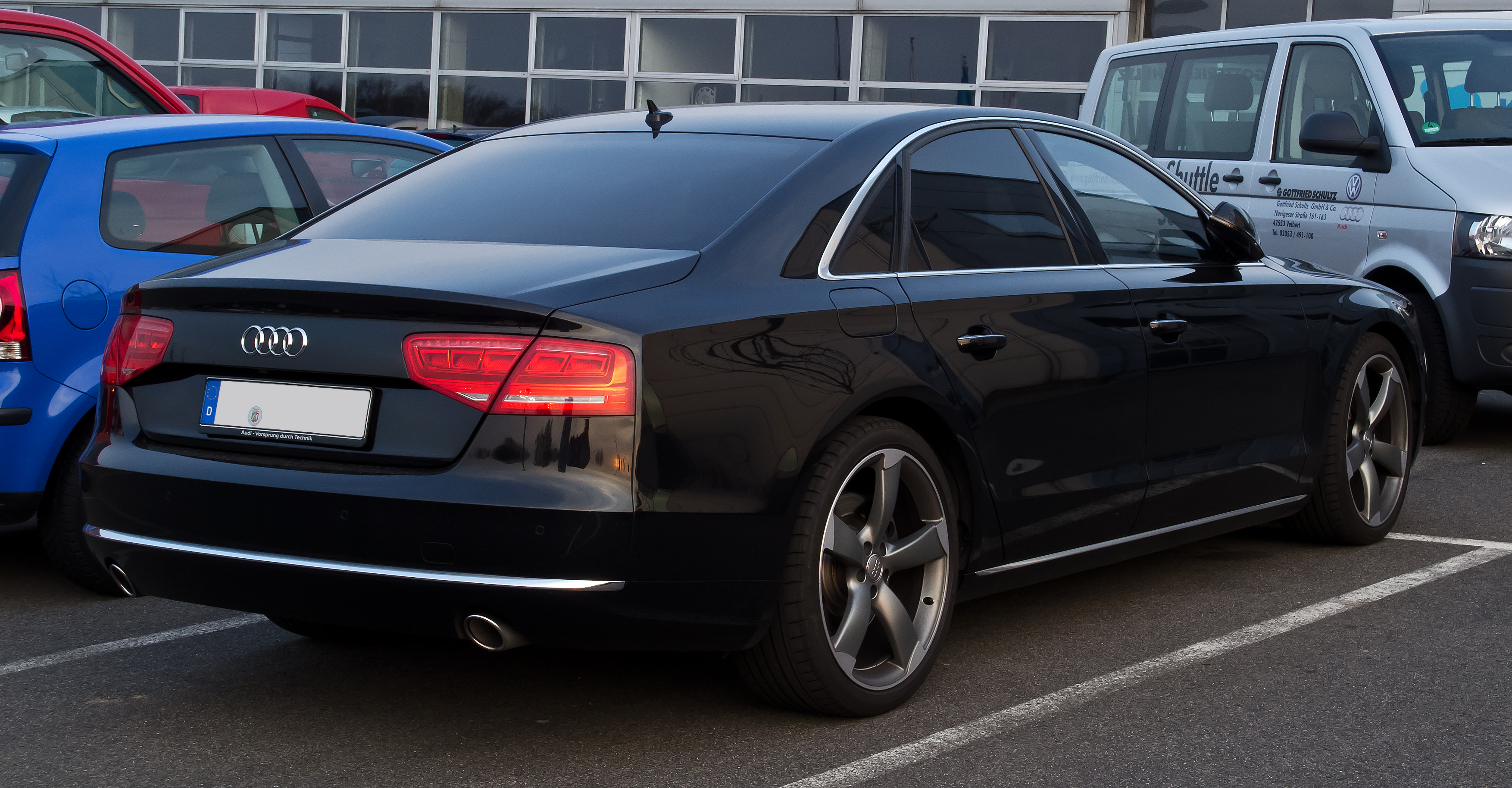 Audi A8 quattro (D4)